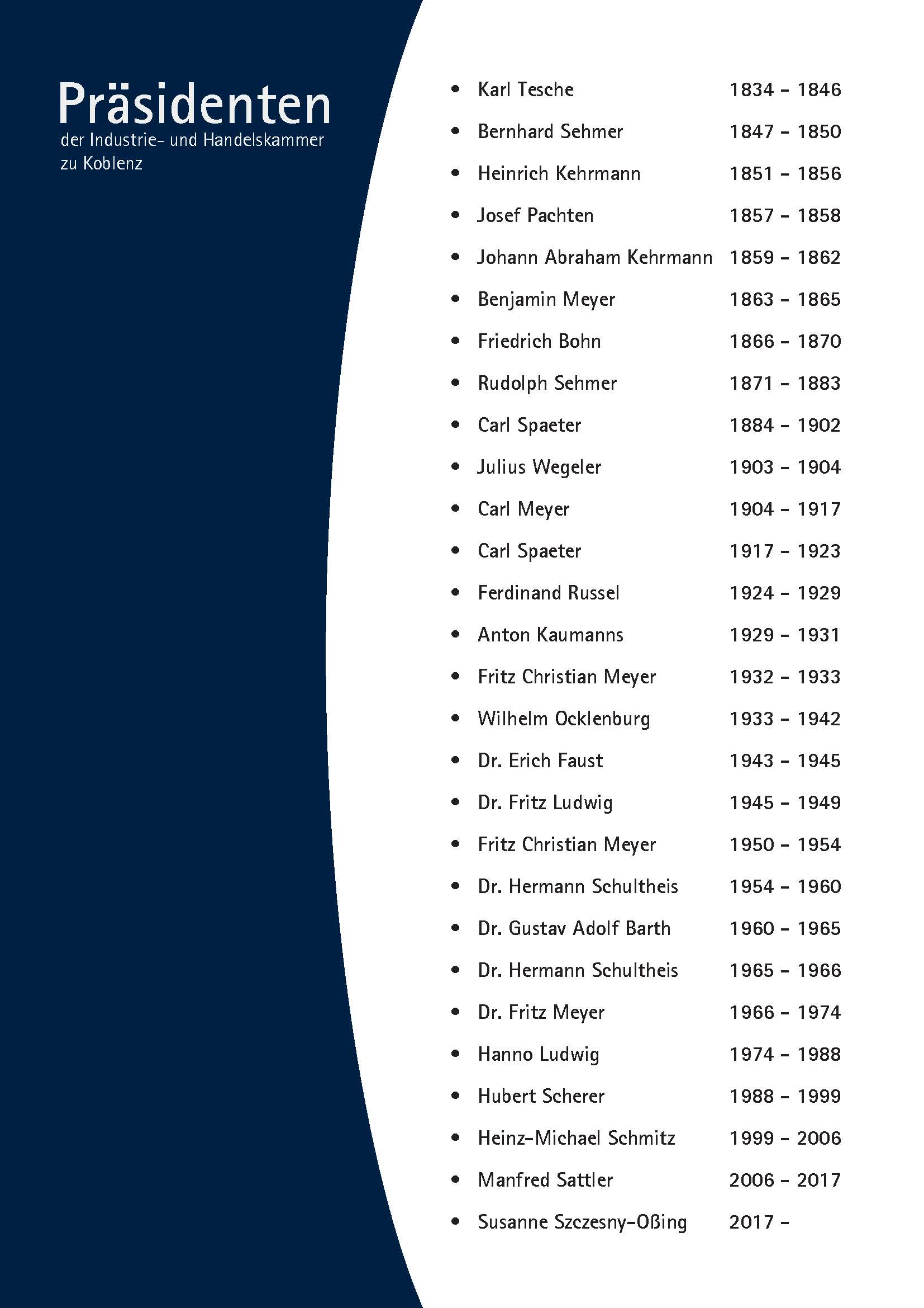 Präsidentenchronik der IHK Koblenz